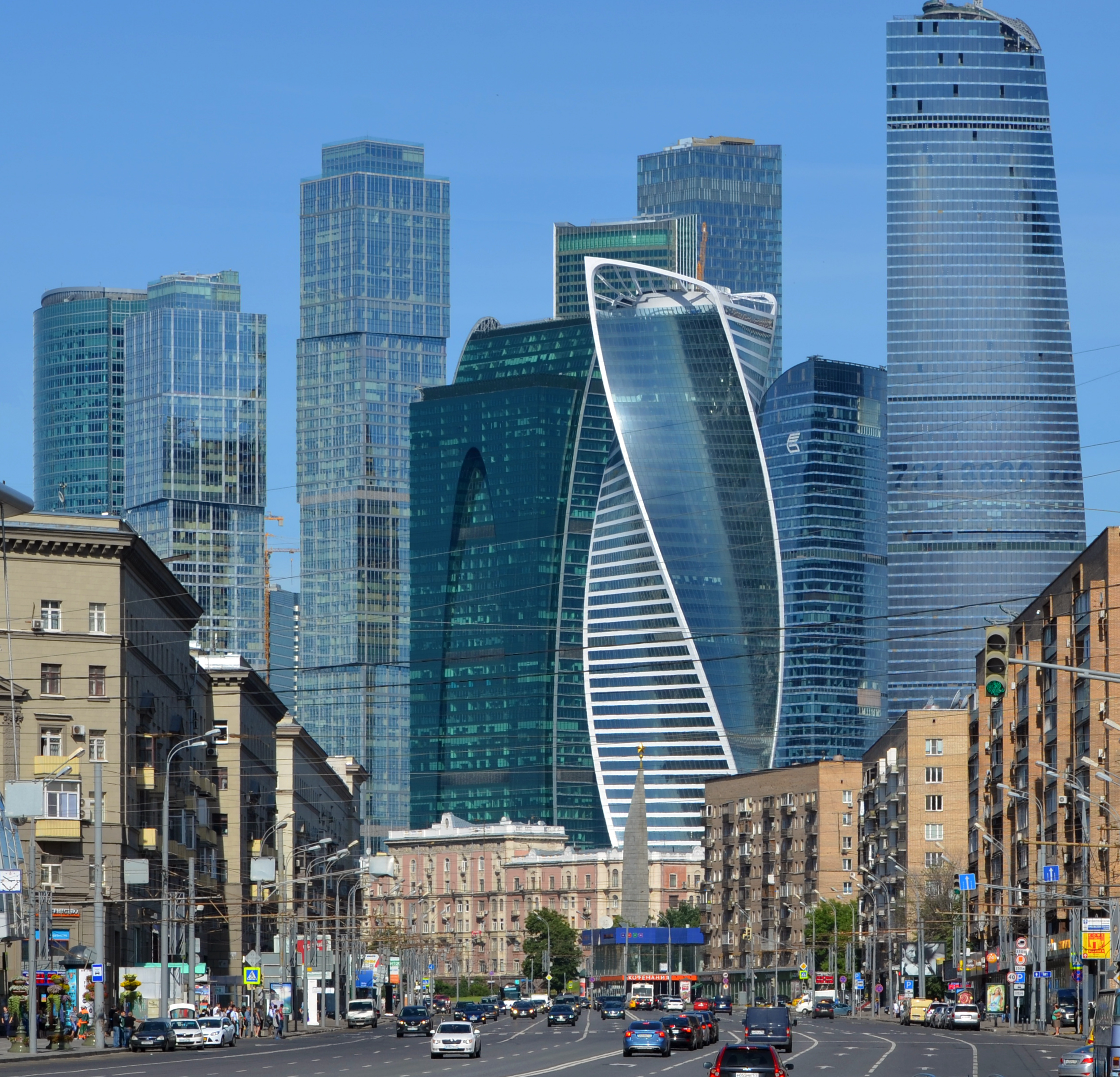 Москва, Большая Дорогомиловская улица